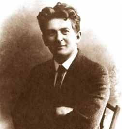 Itamar Ben Avi איתמר בן אב"י